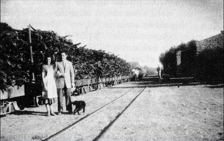 Roberto Roberts (último jefe de la Estación Boca de la Zanja), junto a su esposa Luisa Llopis. El tren está cargado de maderas